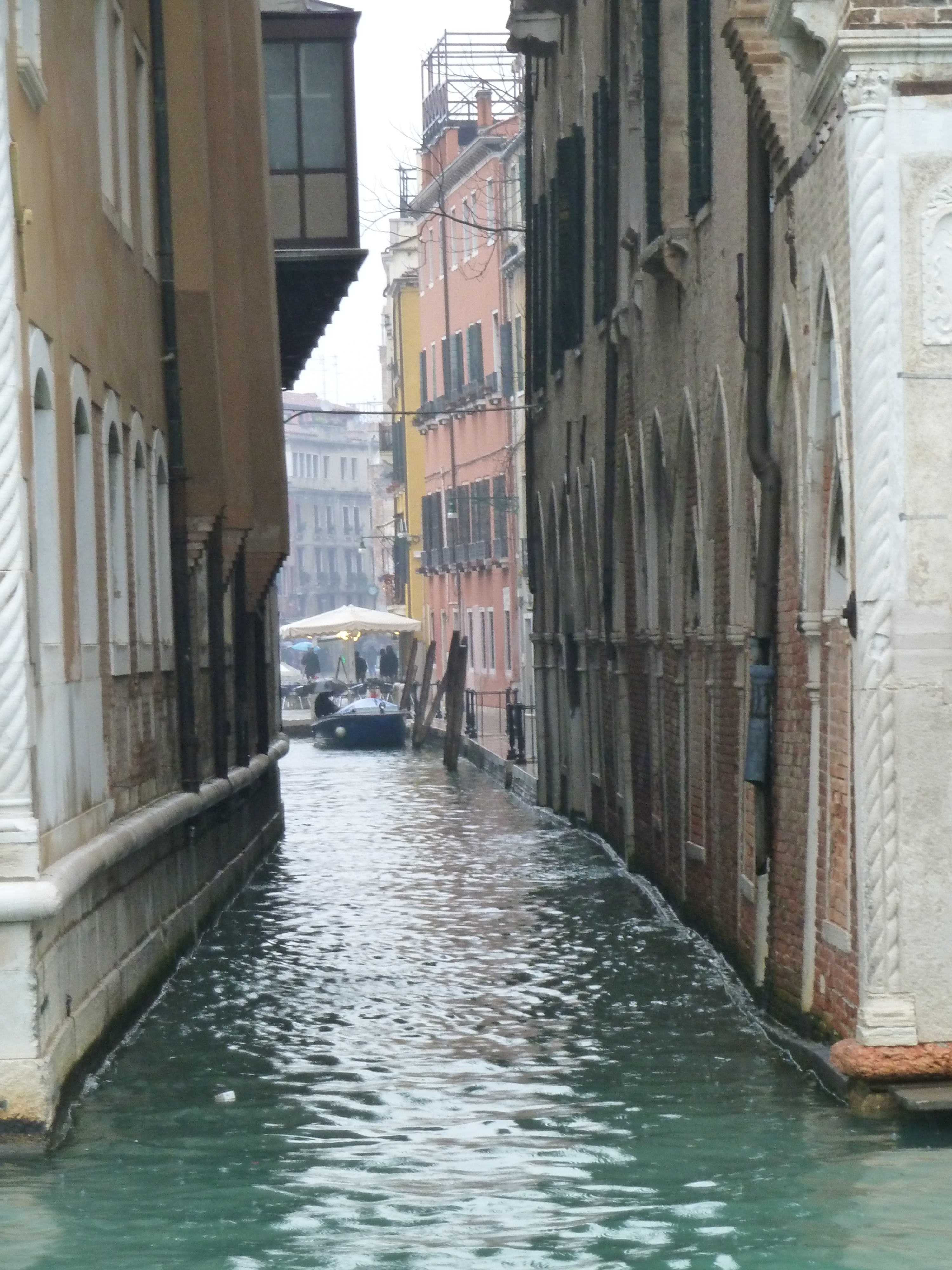 Rio dell'Orso (Venice)